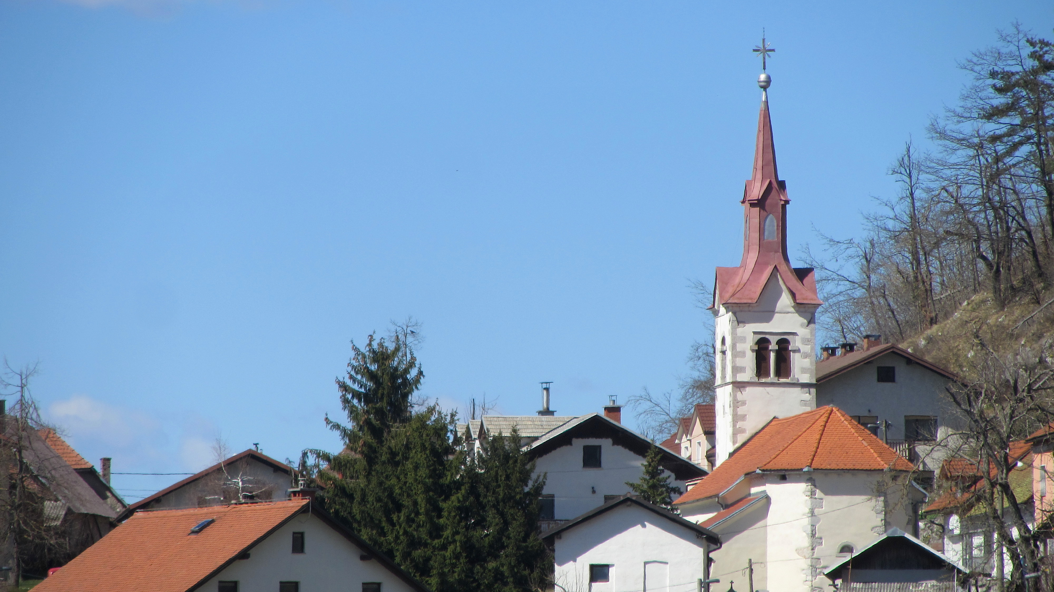 Slovenia, Ljubljana 011